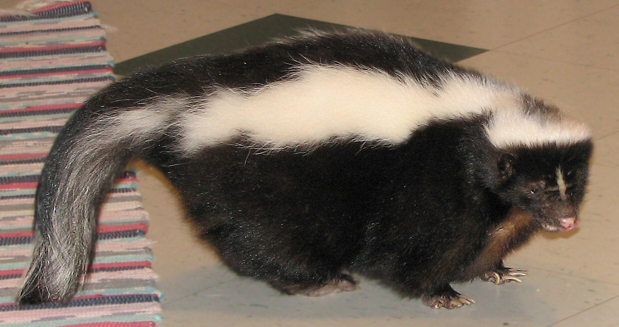 Pet skunk in kitchen